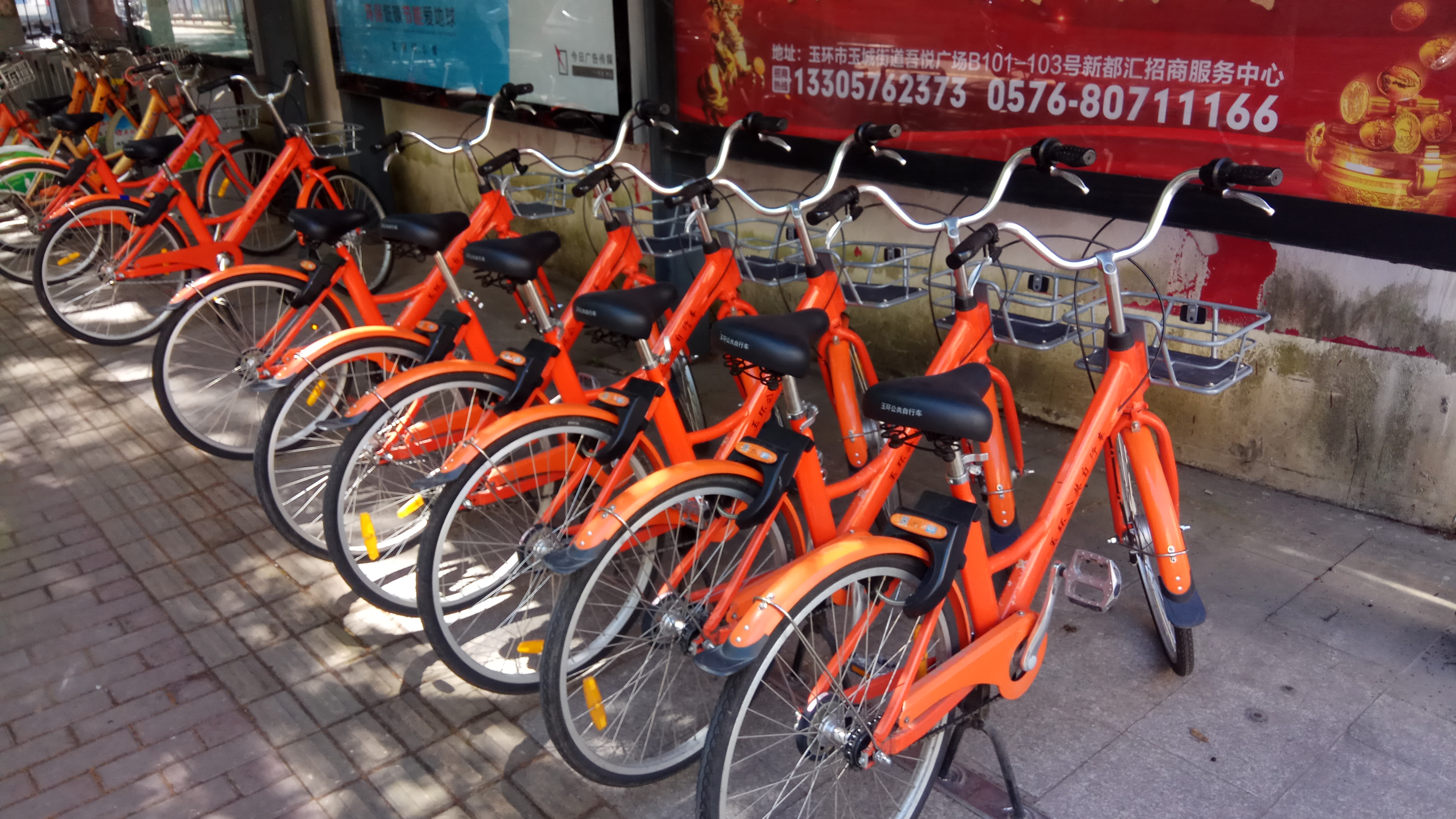 中文（中国大陆）: 玉环公共自行车系统